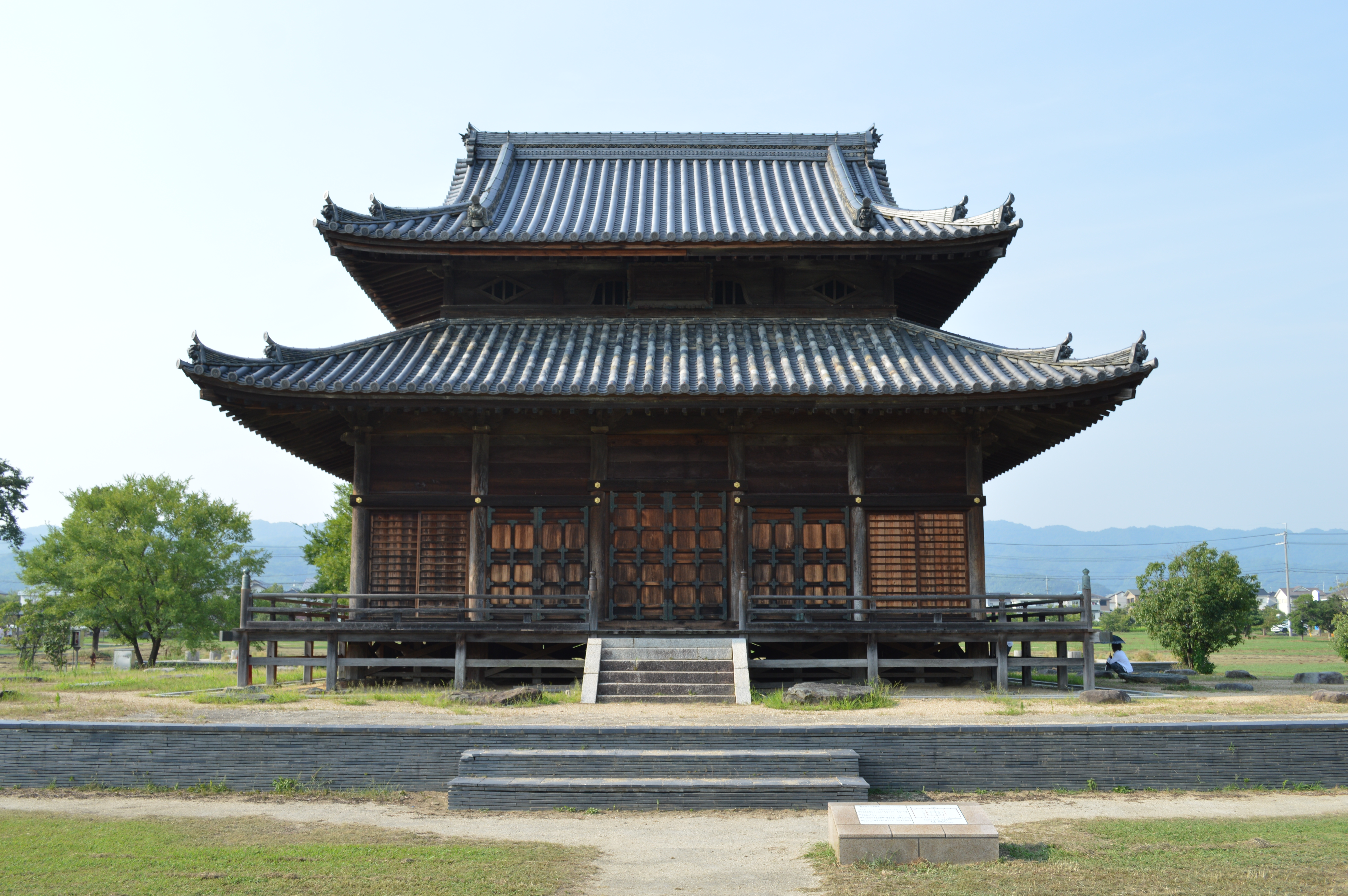 紀伊国分寺 本堂